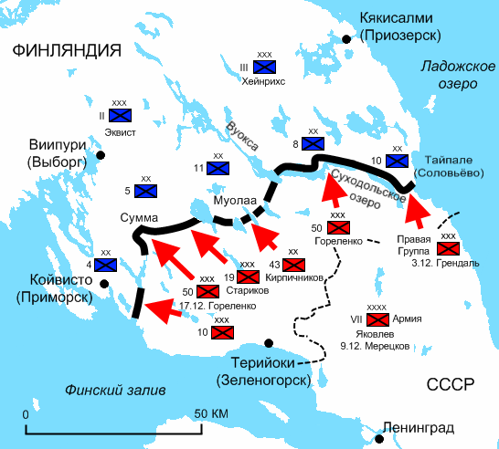 Зимняя война. Карельский перешеек. Карта боевых действий. декабрь 1939 г. Линия Маннергейма Финны Красная Армия